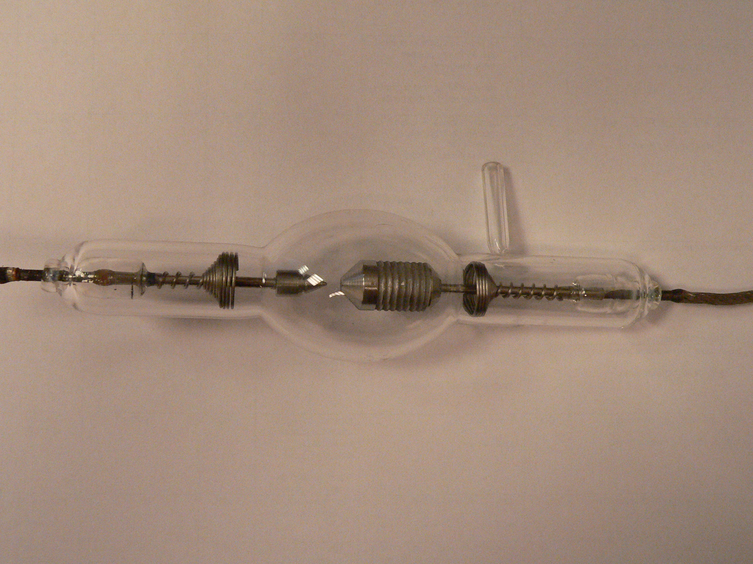 Félkész nagynyomású, xenon rövidívű lámpa. A lámpa teljes hossza kb. 18 cm, teljesítménye kb. 1500W. Jobb oldalt látható az ún. szívőcső ezen keresztűl szívattyúzzák le és töltik fel a lámpát.